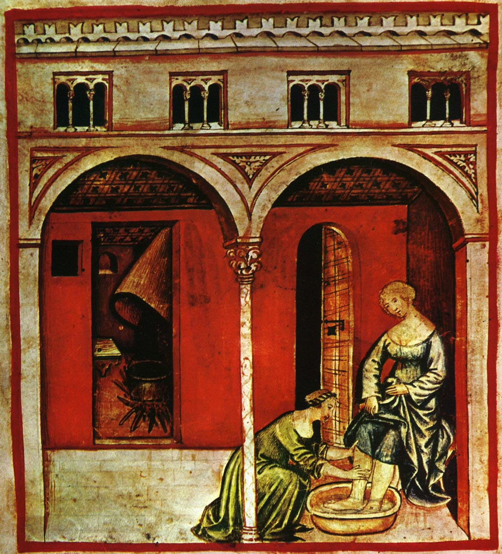 Tacuina sanitatis (XIV century) 5-alimenti, acqua calda,Taccuino Sanitatis, Casanatense 418